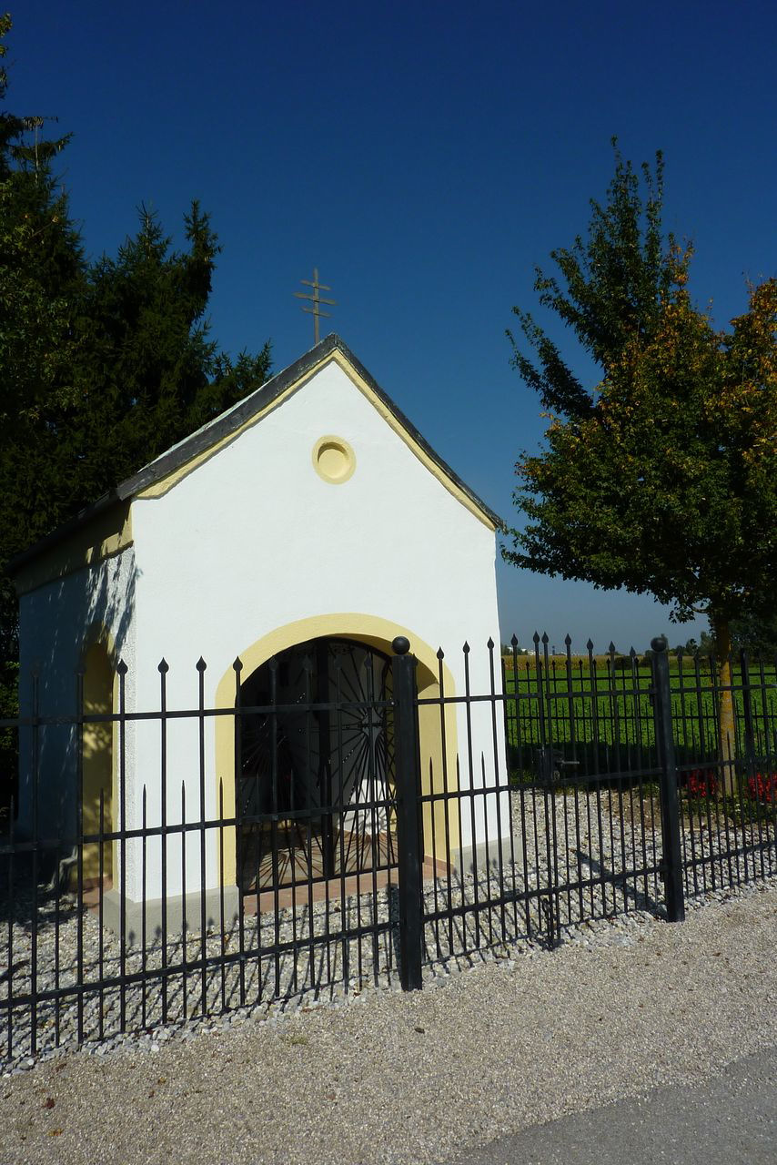 Baudenkmal 82024 Taufkirchen, Pötting 3 Hofkapelle St. Sebastian, kleiner Putzbau mit Apsis und Portikus, modern bez. 1867; mit Ausstattung. Denkmalnummer: D-1-84-145-8 Koordinaten: 48.040290 11.610661